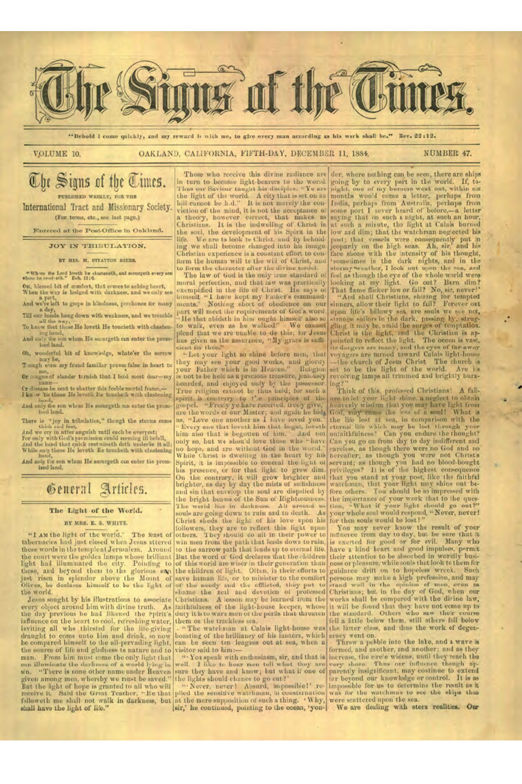 Première page de la revue Sign of the Times de 1884